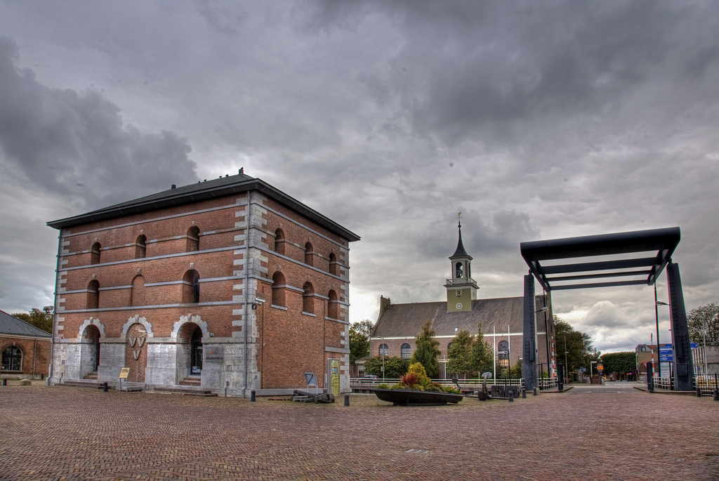 Stoommachinegebouw (gebouw 47, 1816, neoclassicistische bouwstijl, ontwerp Jan Blanken Jansz.) Het Stoommachinegebouw of Pompgebouw was het eerste gebouw op Willemsoord dat gereed was. Bij de restauratie hebben de negen pompcilinders die nog aanwezig wareneen accent gekregen in de vorm van een rood lichtje in de vloer. Het gebouw deed oorspronkelijk dienst als stoomgemaal bij het Oude Dok en vanaf 1864 is het hoofdzakelijk gebruikt als graanpakhuis. Nu wordt het gebouw gebruikt als kantoor door Willemsoord B.V. Op de begane grond heeft de VVV een vestiging.